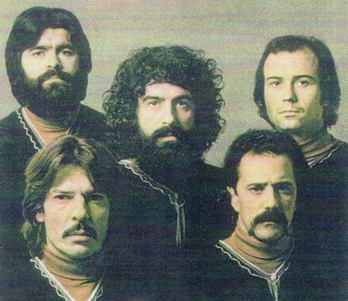 Contracanto, grupo folclórico de la Argentina. Esta fotografía corresponde a la portada del LP Yo te nombro, editado en la Argentina en 1970.